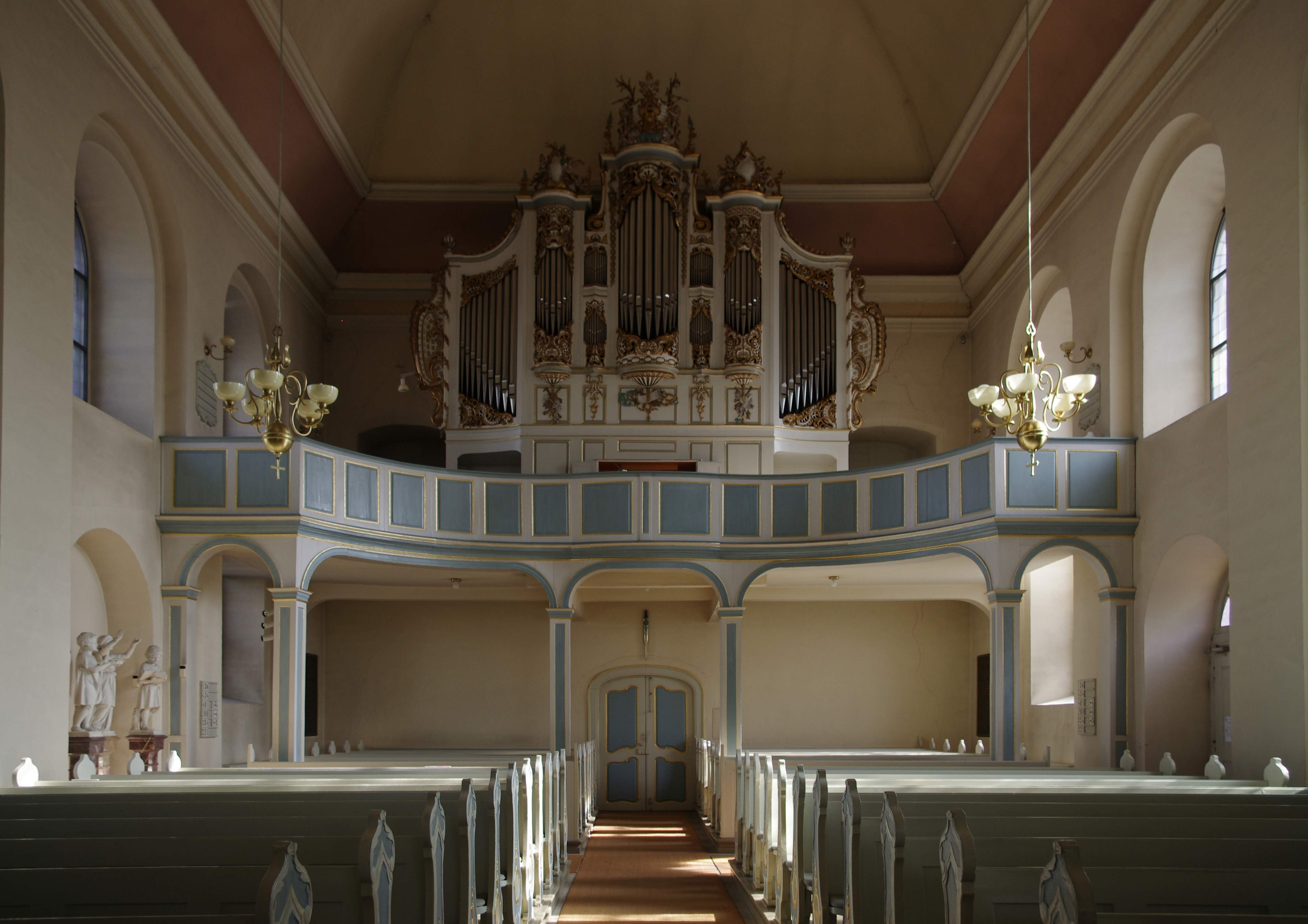 Bad Arolsen in Hessen. Die Orgel der Kirche mit der Empore. Links in der Wandnischen befinden sich drei Figuren von Christian Daniel Rauch.